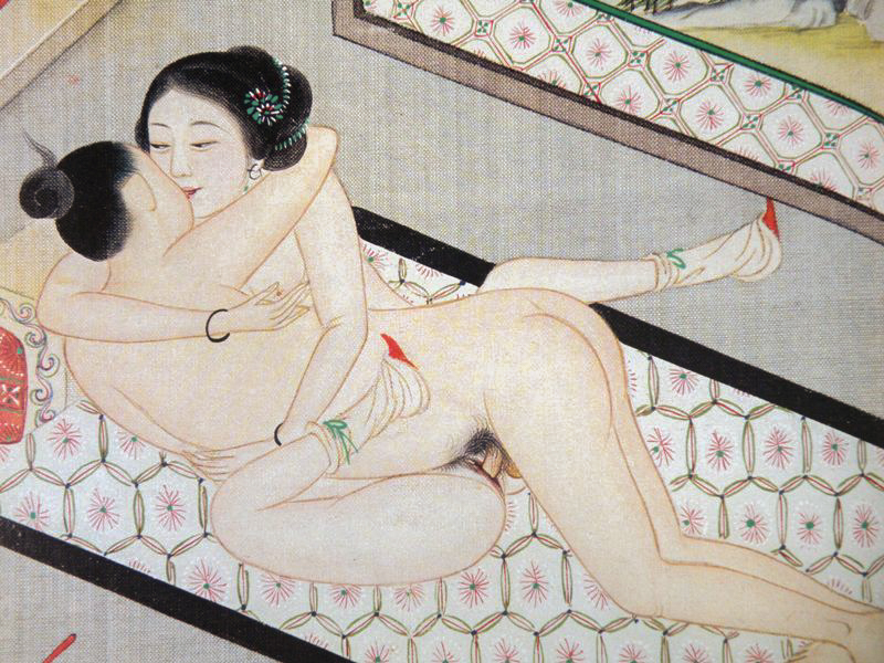 中文（香港）: 清代春宮圖